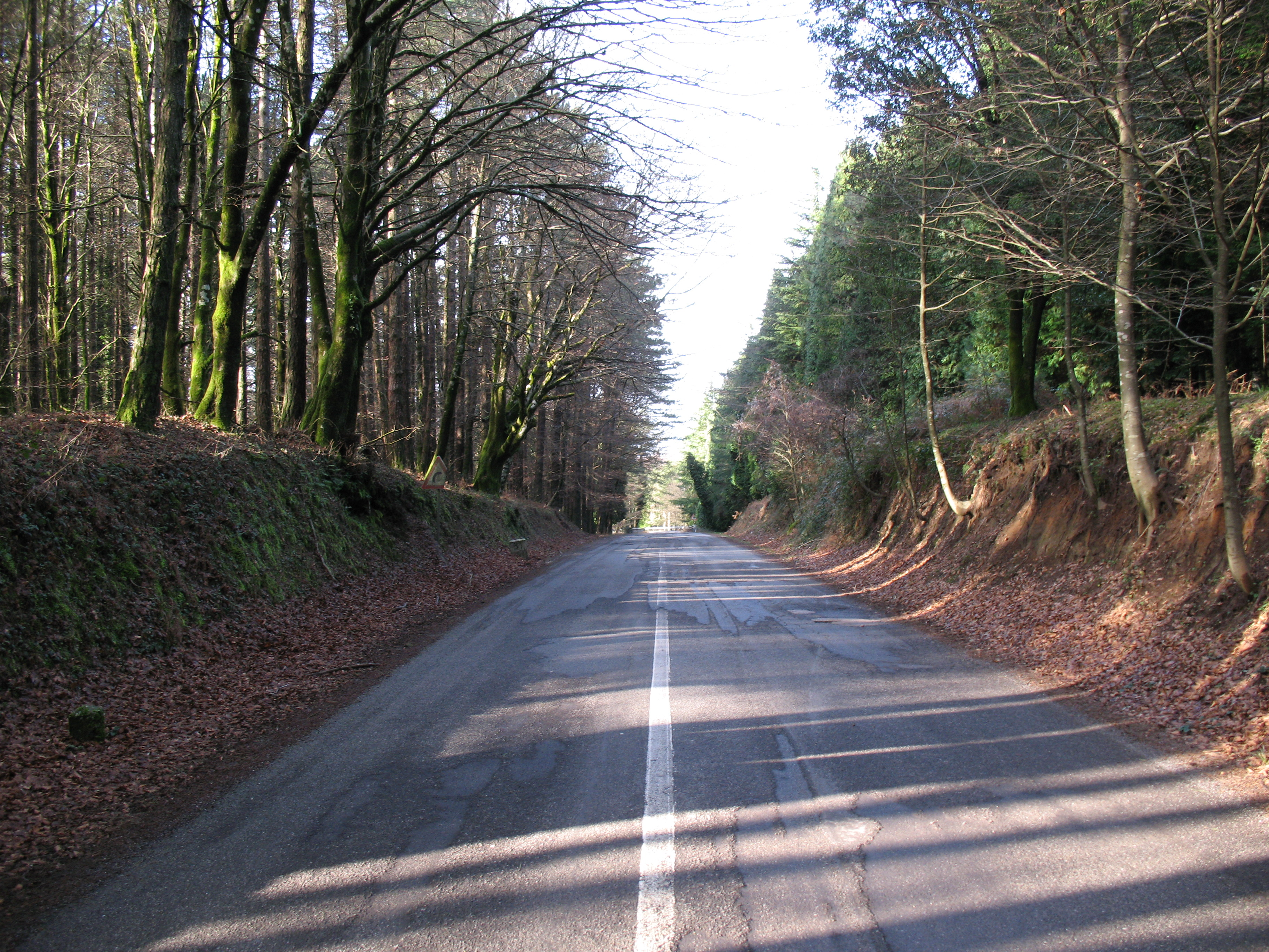 Strada Provinciale 1 di Gioia Tauro e Locri, Piani di Zomaro